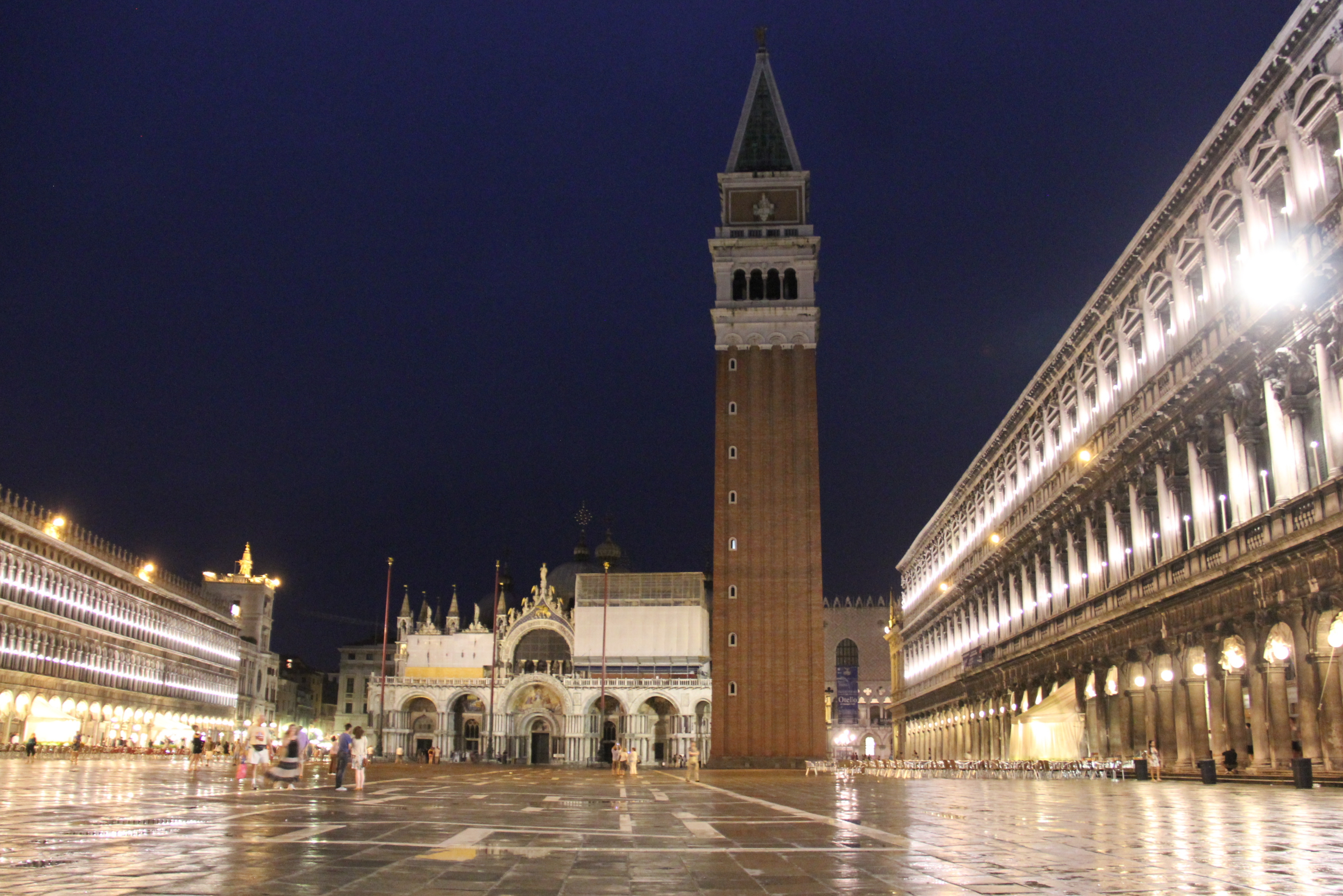 Venice